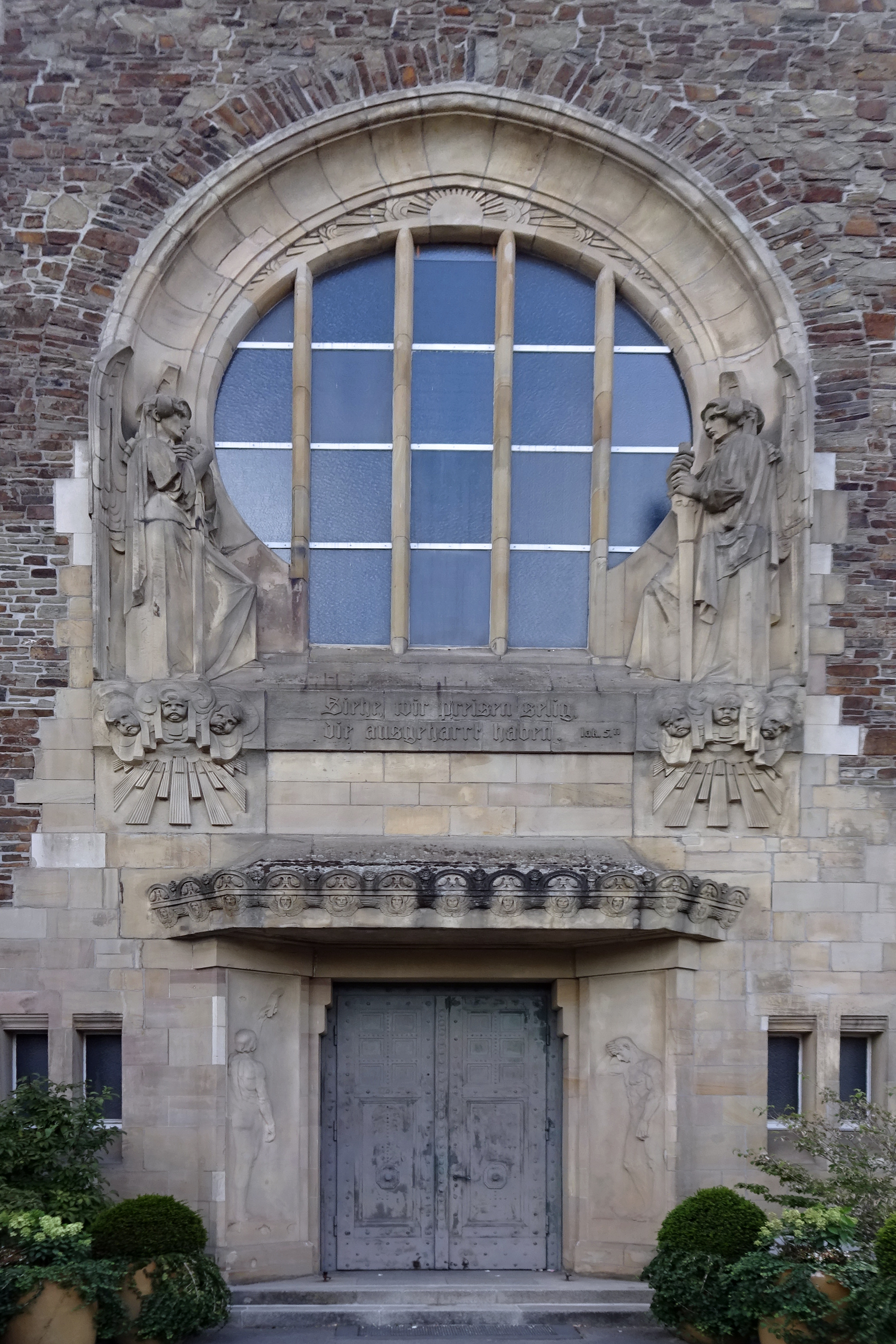 Eingangsportal der 1908 fertiggestellten Friedhofskapelle auf dem Südfriedhof in Düsseldorf-Bilk; Hauptfenster in Form des Lebensbaumes, flankiert von zwei Todesengeln von dem österreichischen, damals in Düsseldorf ansässigen Bildhauer Adolf Simatschek